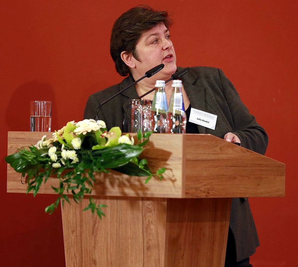 Julie Bindel at a conference in Latvia.